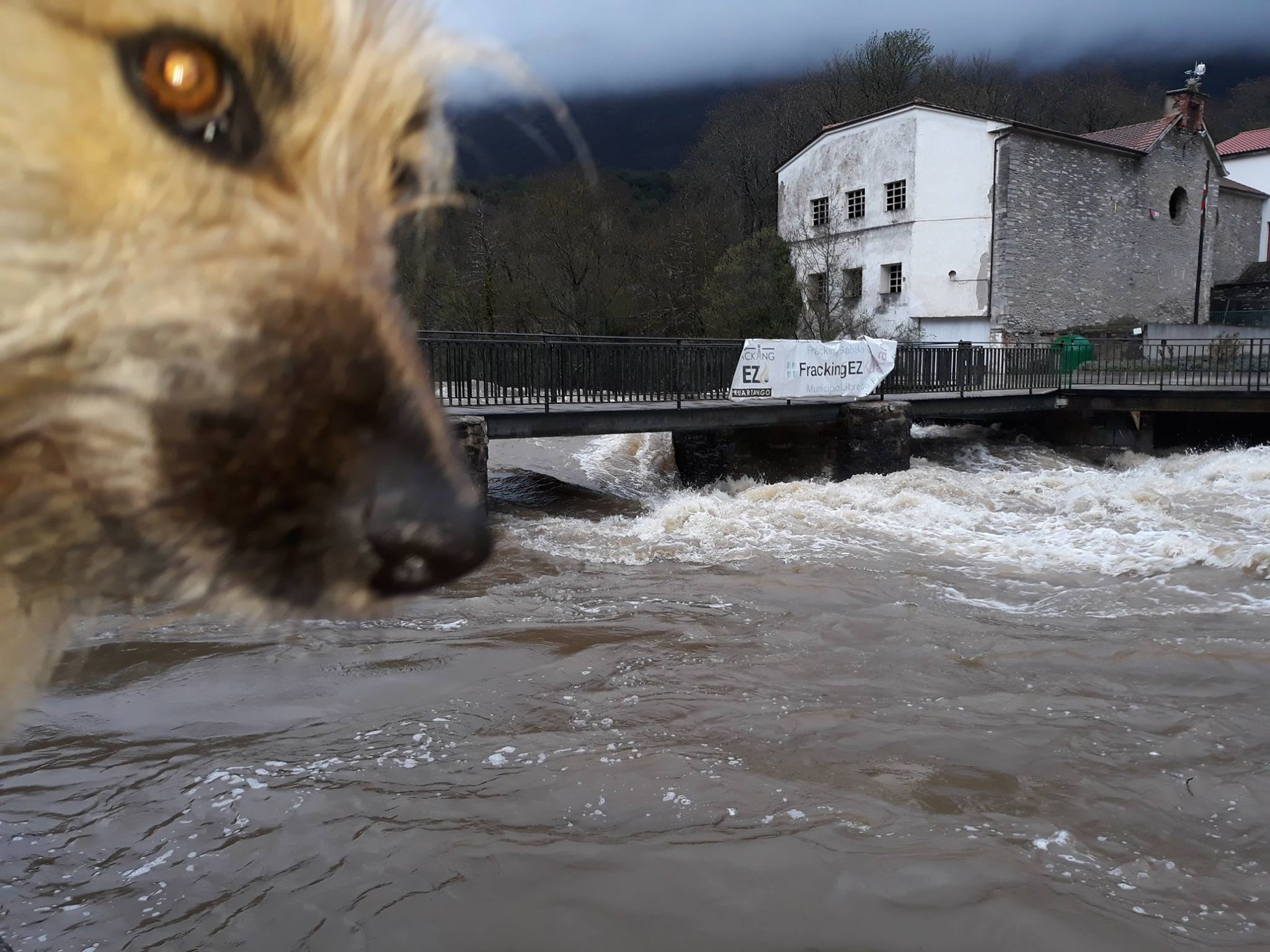 Baia ibaia, Zuhatzuko (Kuartango, Araba) bainuetxearen parean, ia gainezka. Ezkerrean, euskal ardi txakur bat. Eskuinean, bainuetxea.